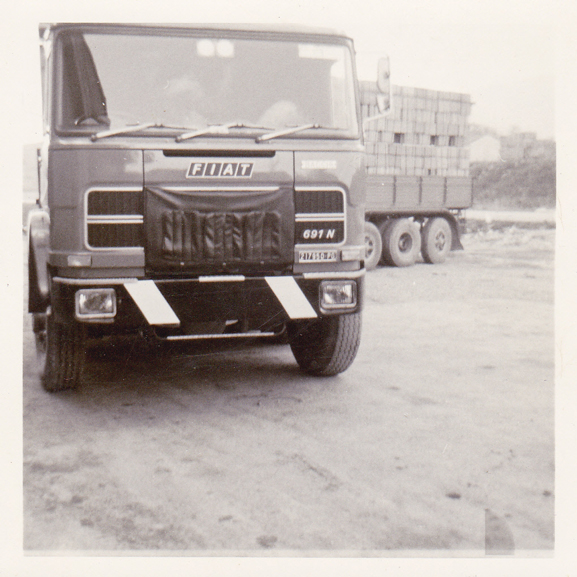 Camion utilizzato da uno dei trasportatori locali per la spedizione del carico nel Sud-Italia.